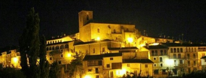 Vista nocturna de San Román de Cameros